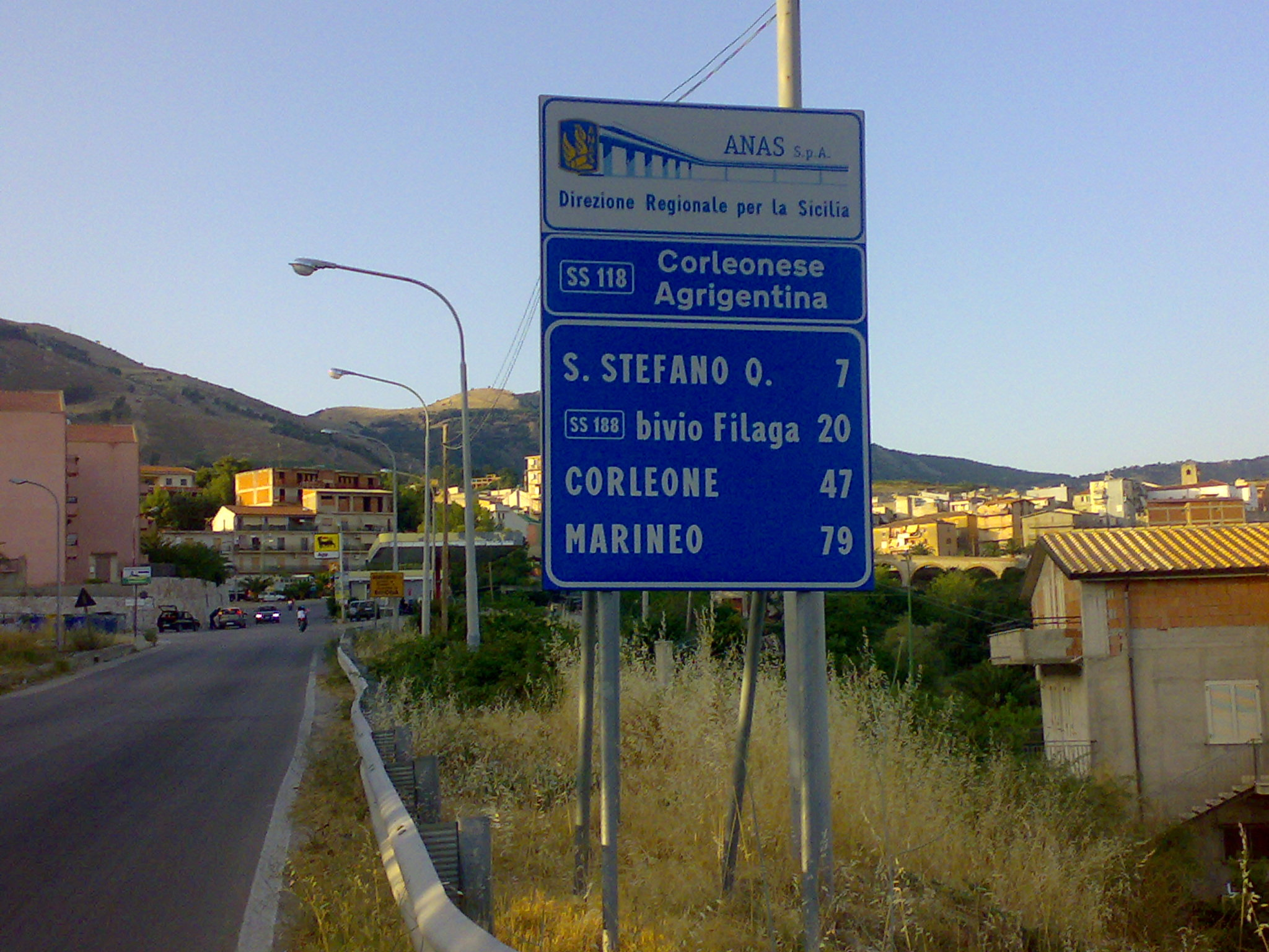 Cartello stradale all'ingresso di Bivona